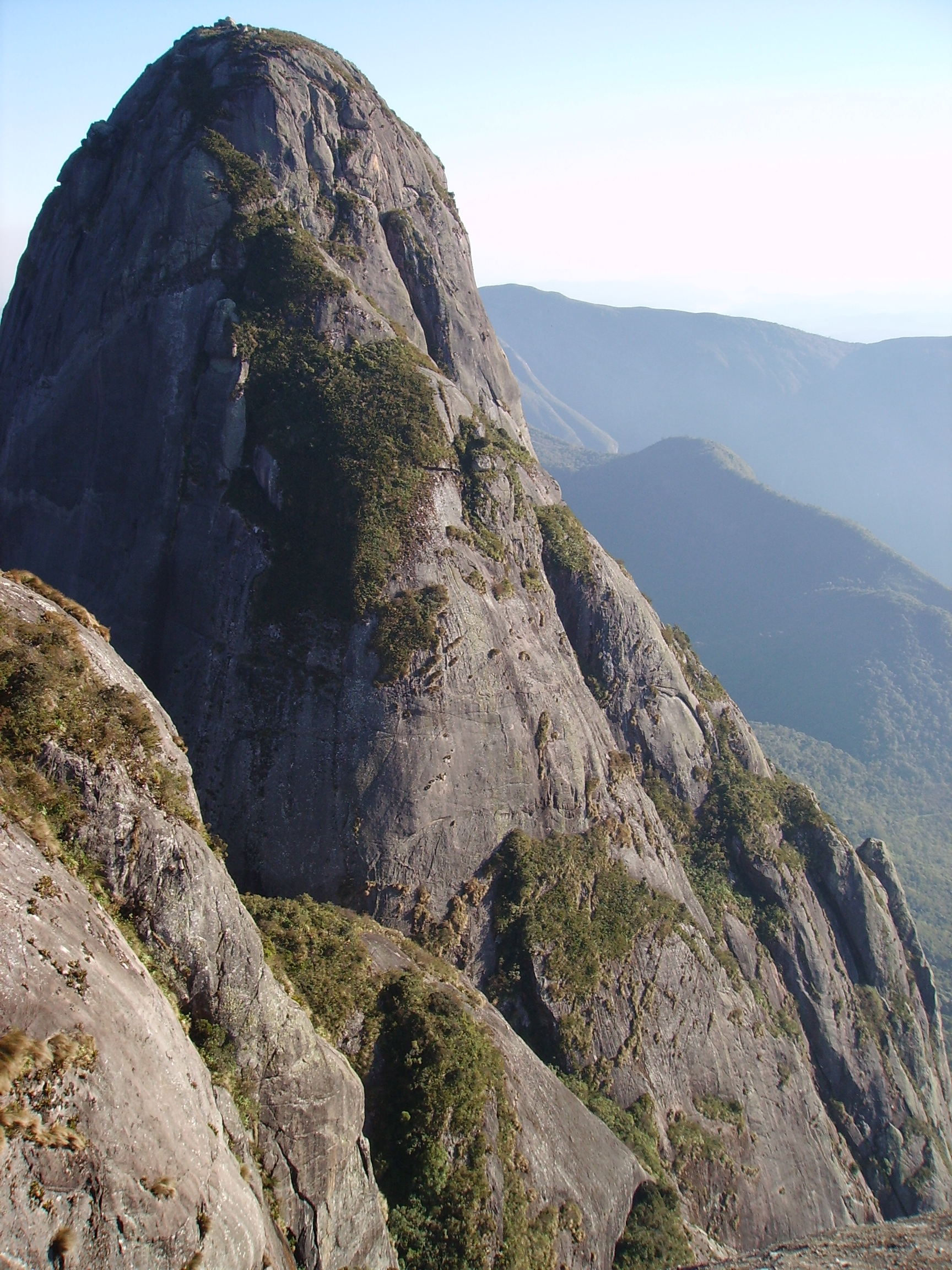 Pico Maior de Friburgo (2.316 metros), localizado em Friburgo, estado do Rio de Janeiro, Brasil - ponto culminante da Serra do Mar